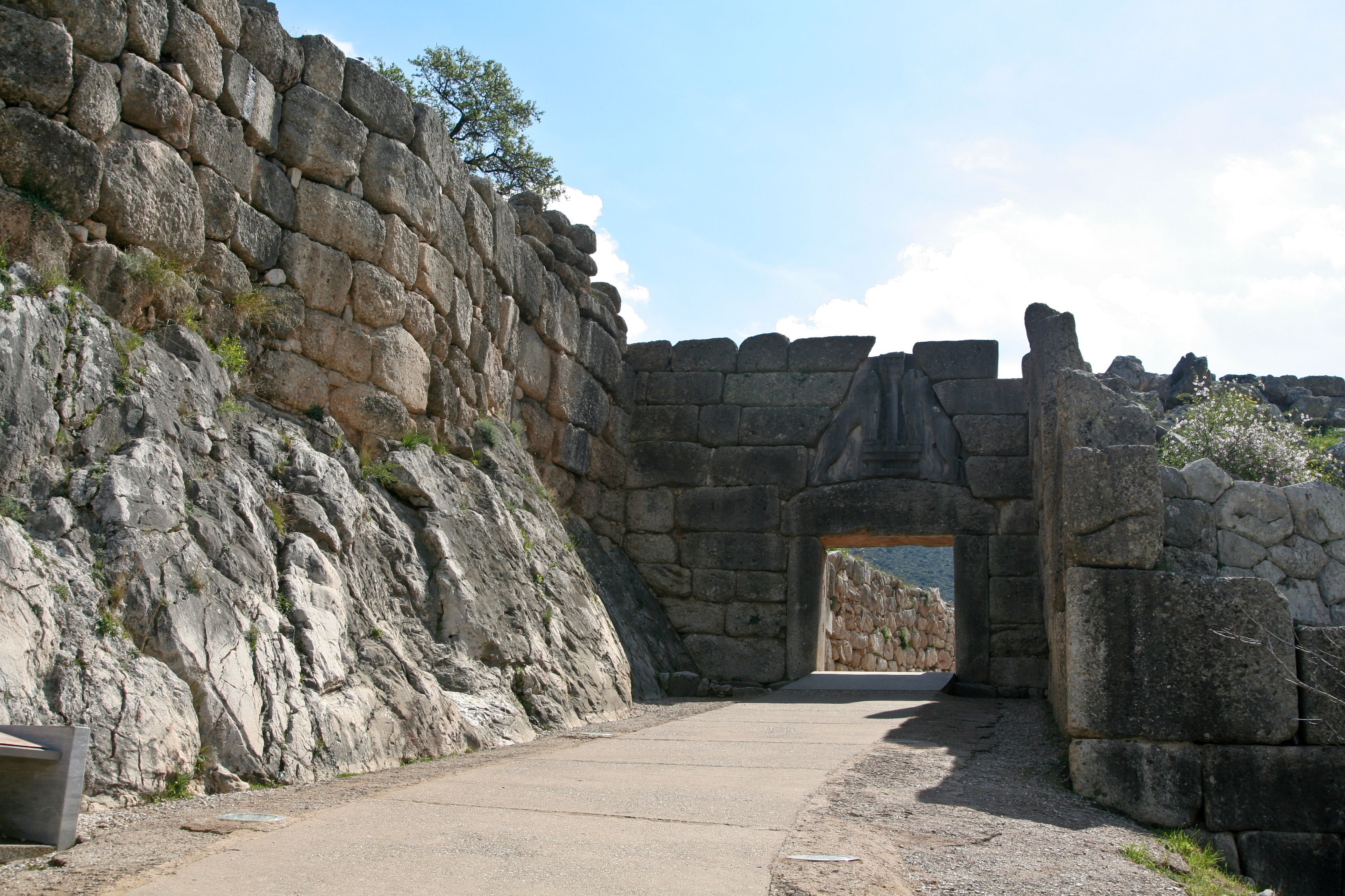 Portico, 1250 AD